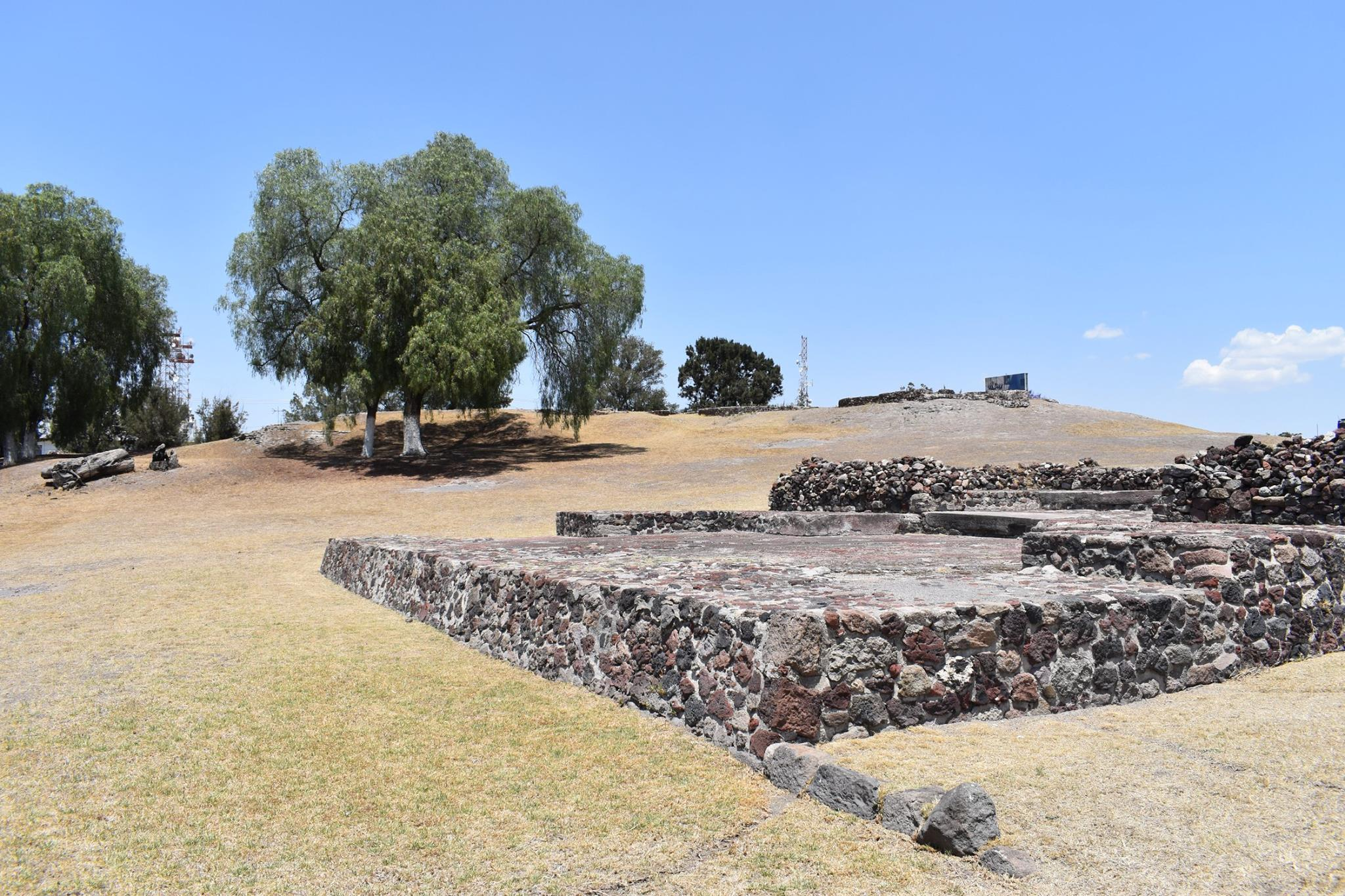 Los Melones